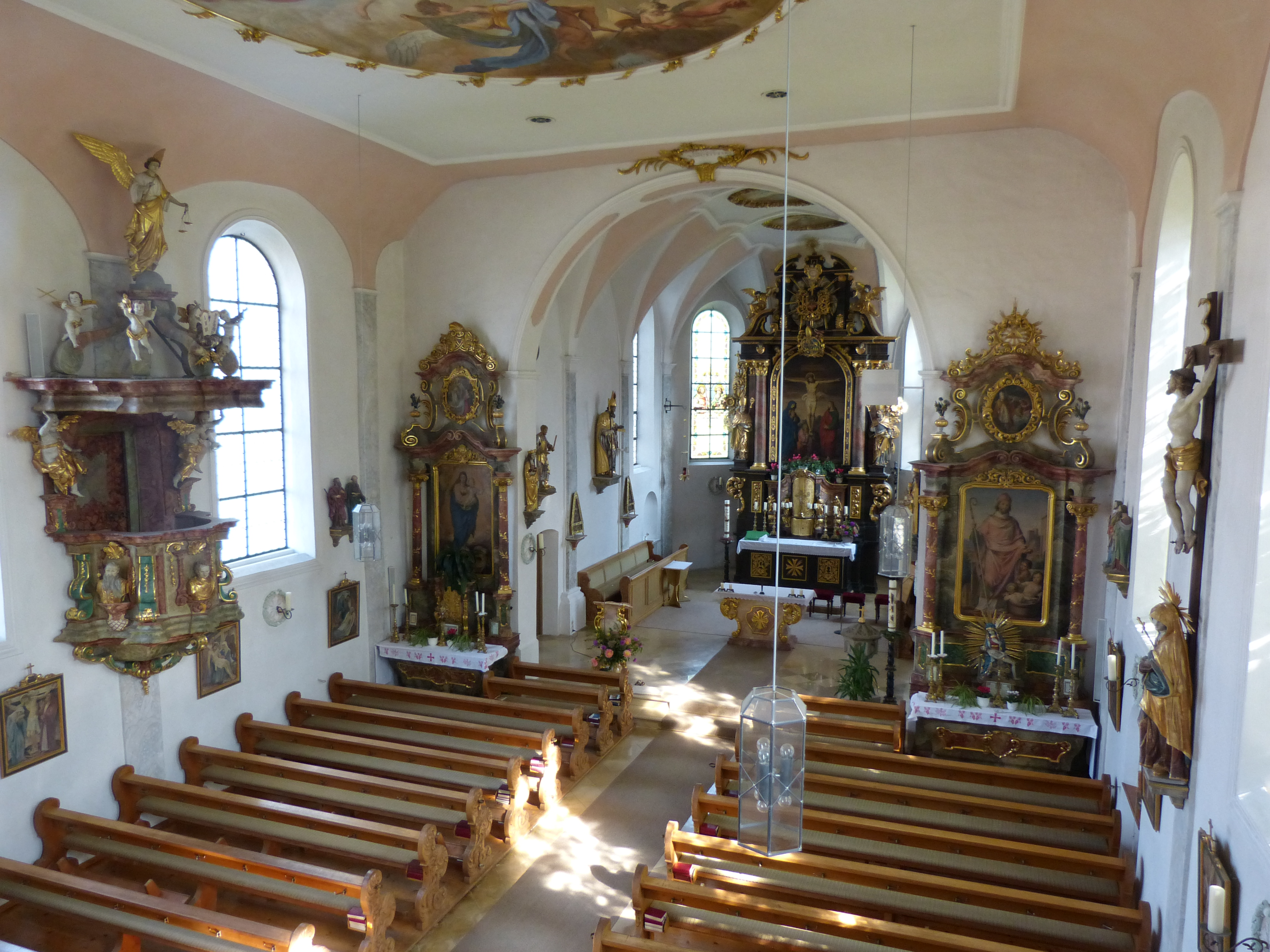 St. Nikolaus in Wiedergeltingen, Landkreis Unterallgäu, BayernThis is a photograph of an architectural monument.